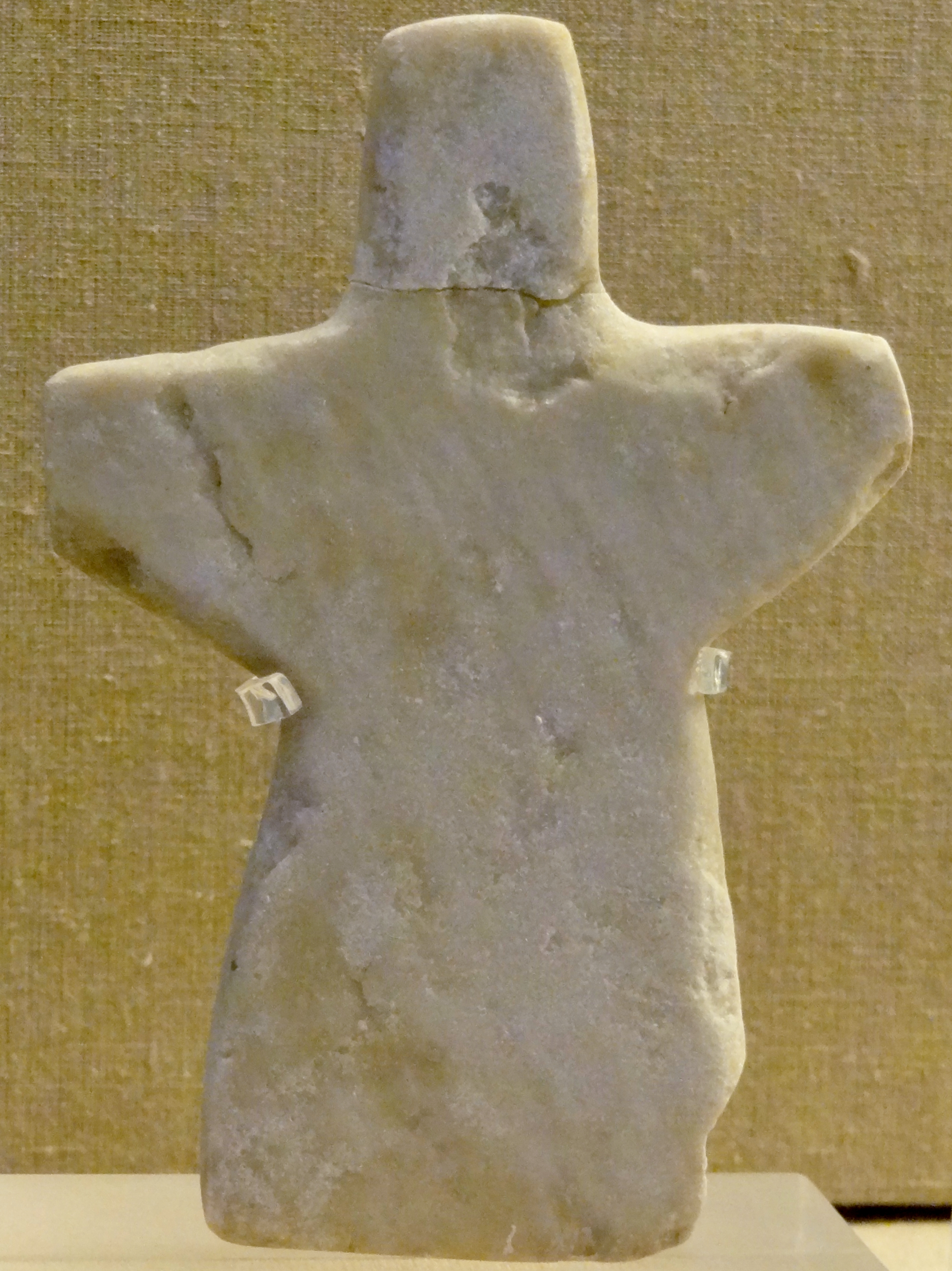 Schematische Marmorfigur (2200–2000 v. Chr.) vom Phylakopi-Typ im Prähistorischen Museum von Thira, Santorin (Thira), Kykladen, Griechenland